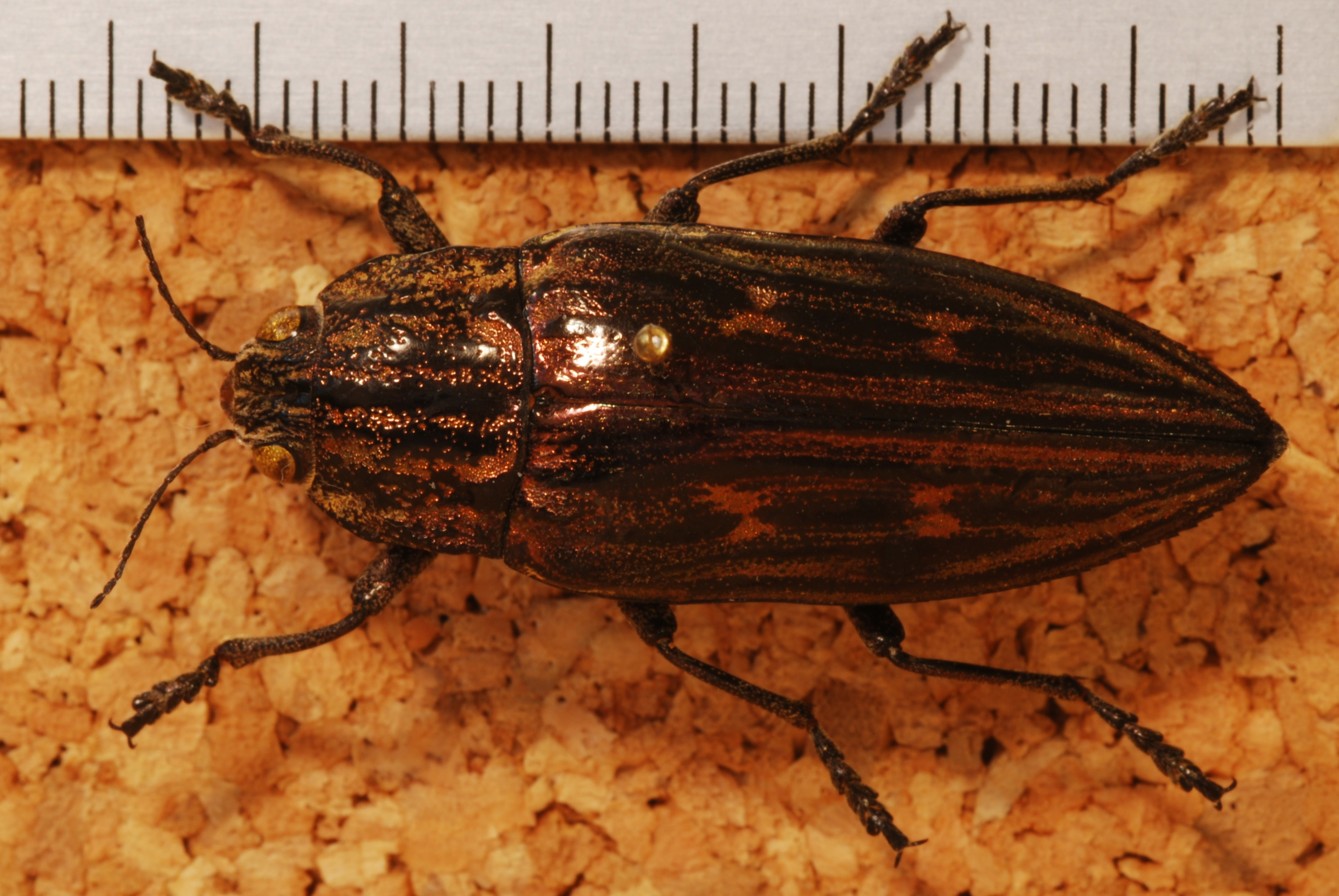 Okinawa, JAPAN